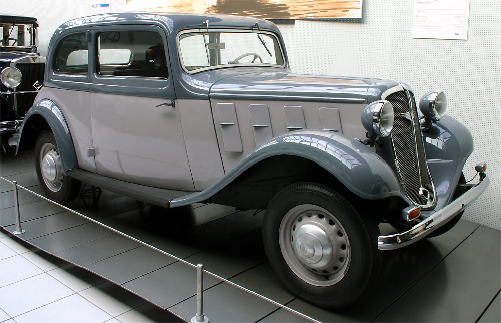 Hanomag Rekord Fotografiert von Softeis, am 3.10.2004 im EFA-Museum für Deutsche Automobilgeschichte